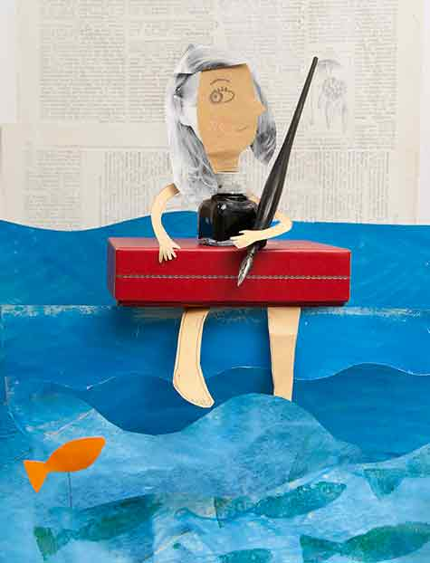 דיוקן עצמי של המאיירת איה גורדון-נוי